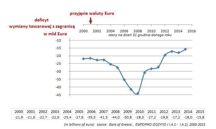 Grecki bilans wymiany towarowej handlu zagranicznego, poczynając od wyników roku poprzedzającego przyjęcie waluty Euro. Źródło: Bank Grecji, Βασικά μεγέθη Ισοζυγίου Πληρωμών - Ετήσια στοιχεία.